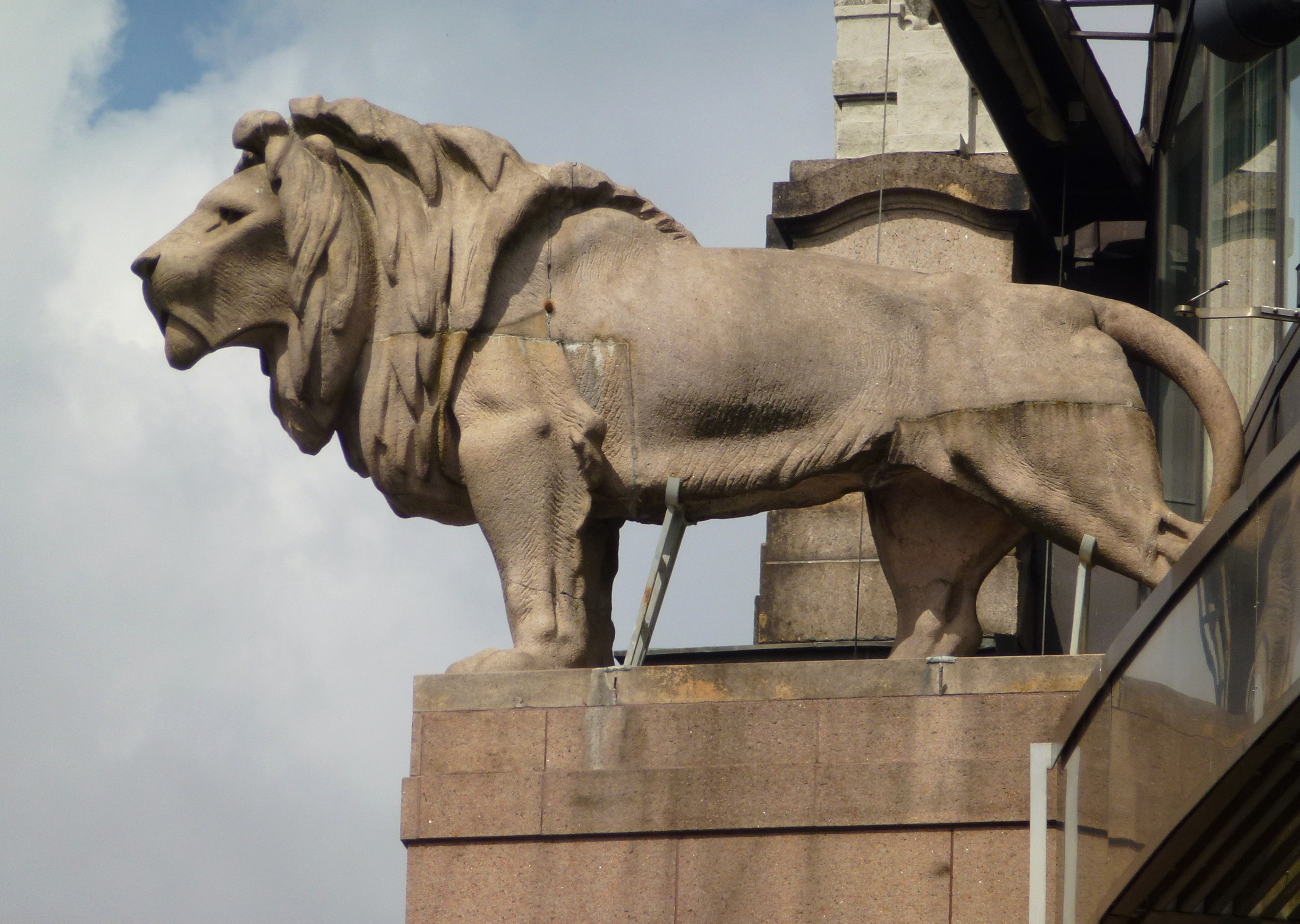 Riksdagshuset, Stockholm, lejonskulptur vid påbyggnaden som tillkom 1983, skulpterad omkring 1905 av Gustav Fredrik Norling (1851-1926). Tidigare satt lejonskulpturen vid det gamla Riksbankshuset.